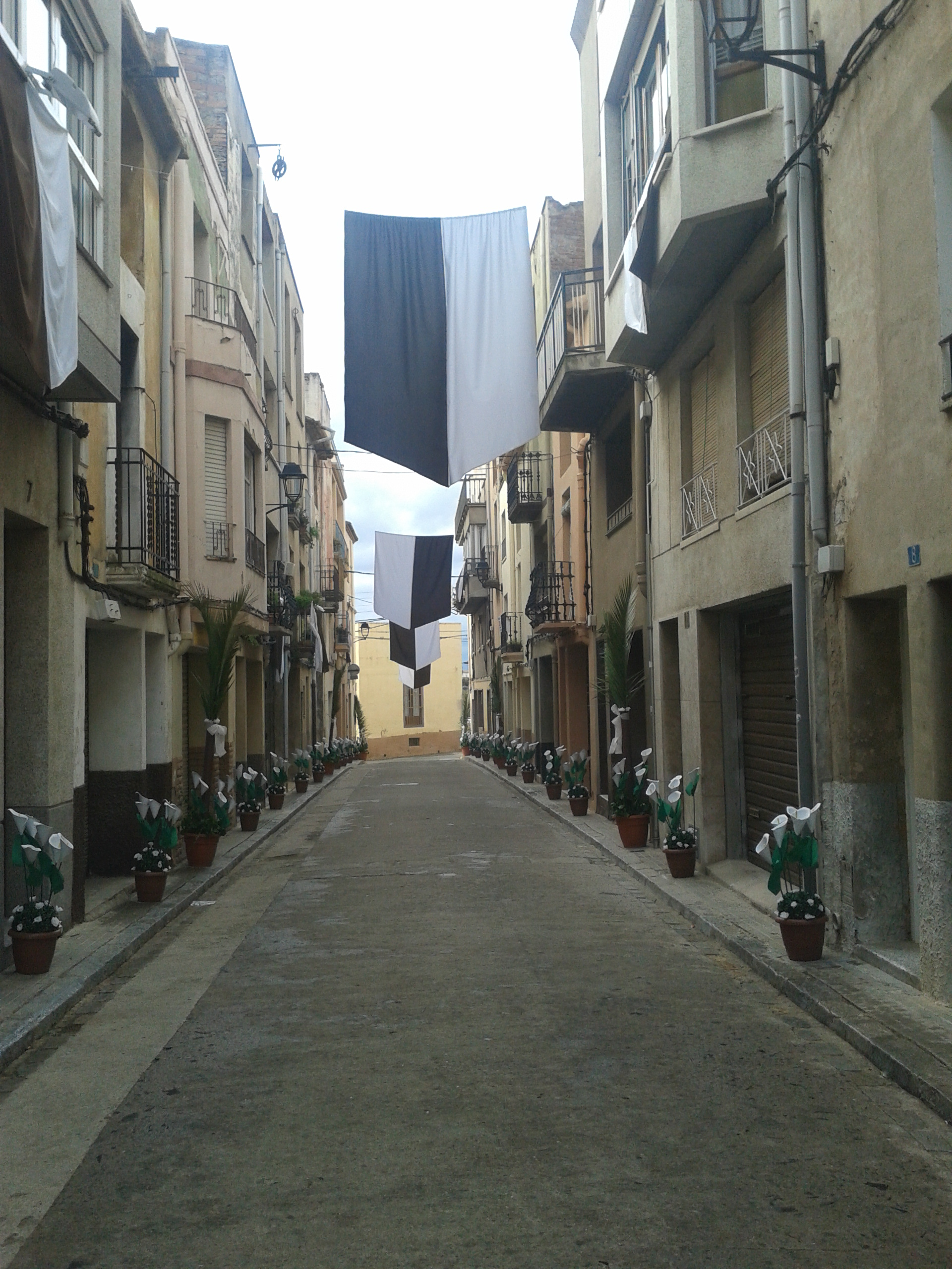 El carrer de Sant Pere de Riudoms guarnit per les festes quinquennals del Beat Bonaventura Gran de 2016